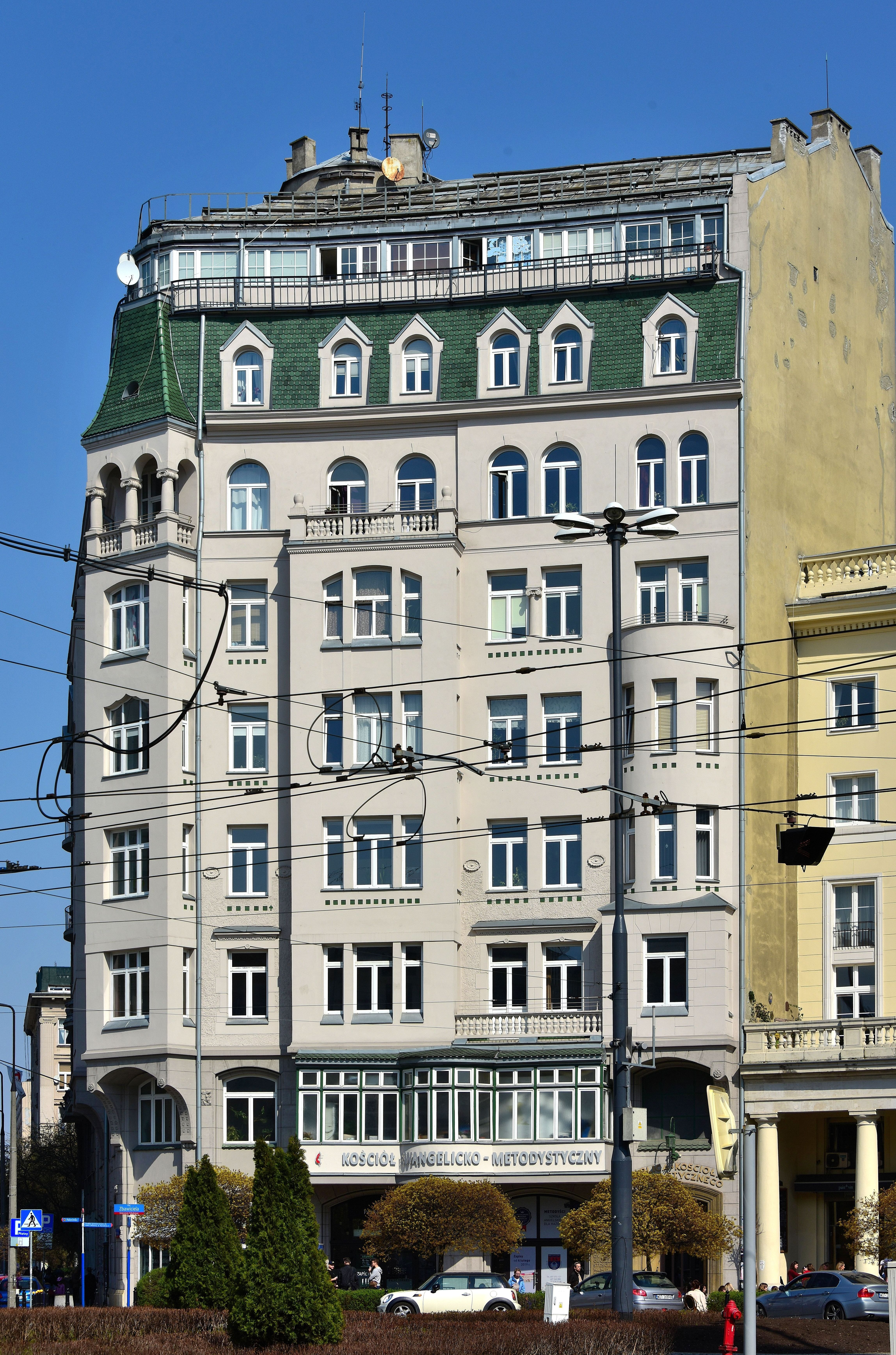 Kamienica Jasieńczyka-Jabłońskiego przy ul. Mokotowskiej 12 w Warszawie